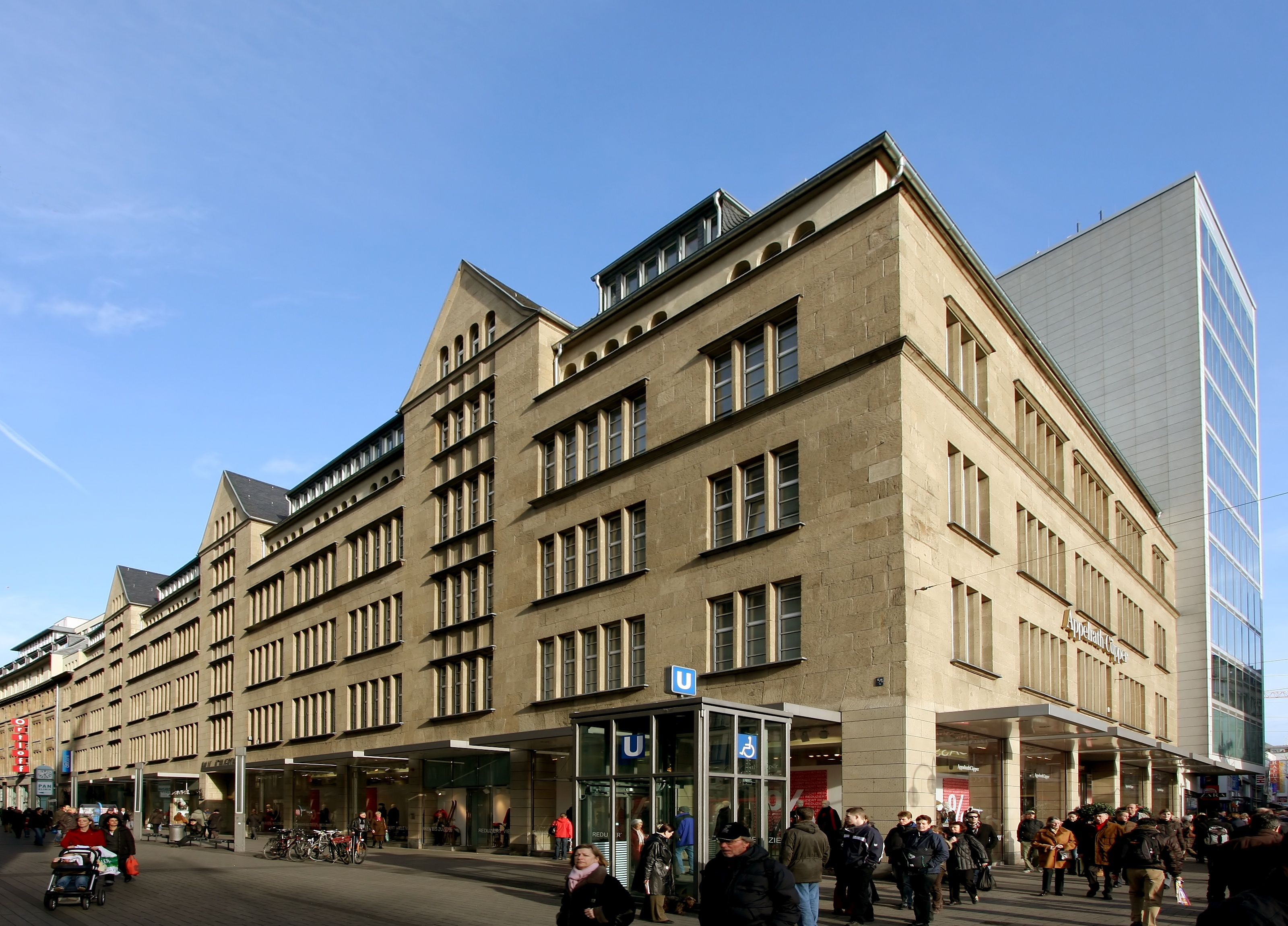 Haus Schwerthof, Ecke Neumarkt/Zeppelinstraße, Köln. Südwestansicht. Architekten: Jacob Koerfer und Theodor Veil